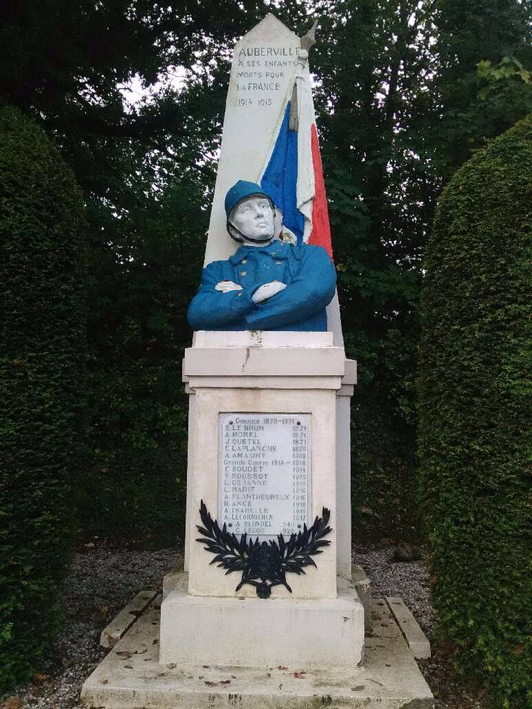 Monument aux morts de la commune d'Auberville (Calvados).